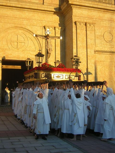 Stmo. Cristo del Amor y de la Paz. Anónimo s. XVIII.Salamanca